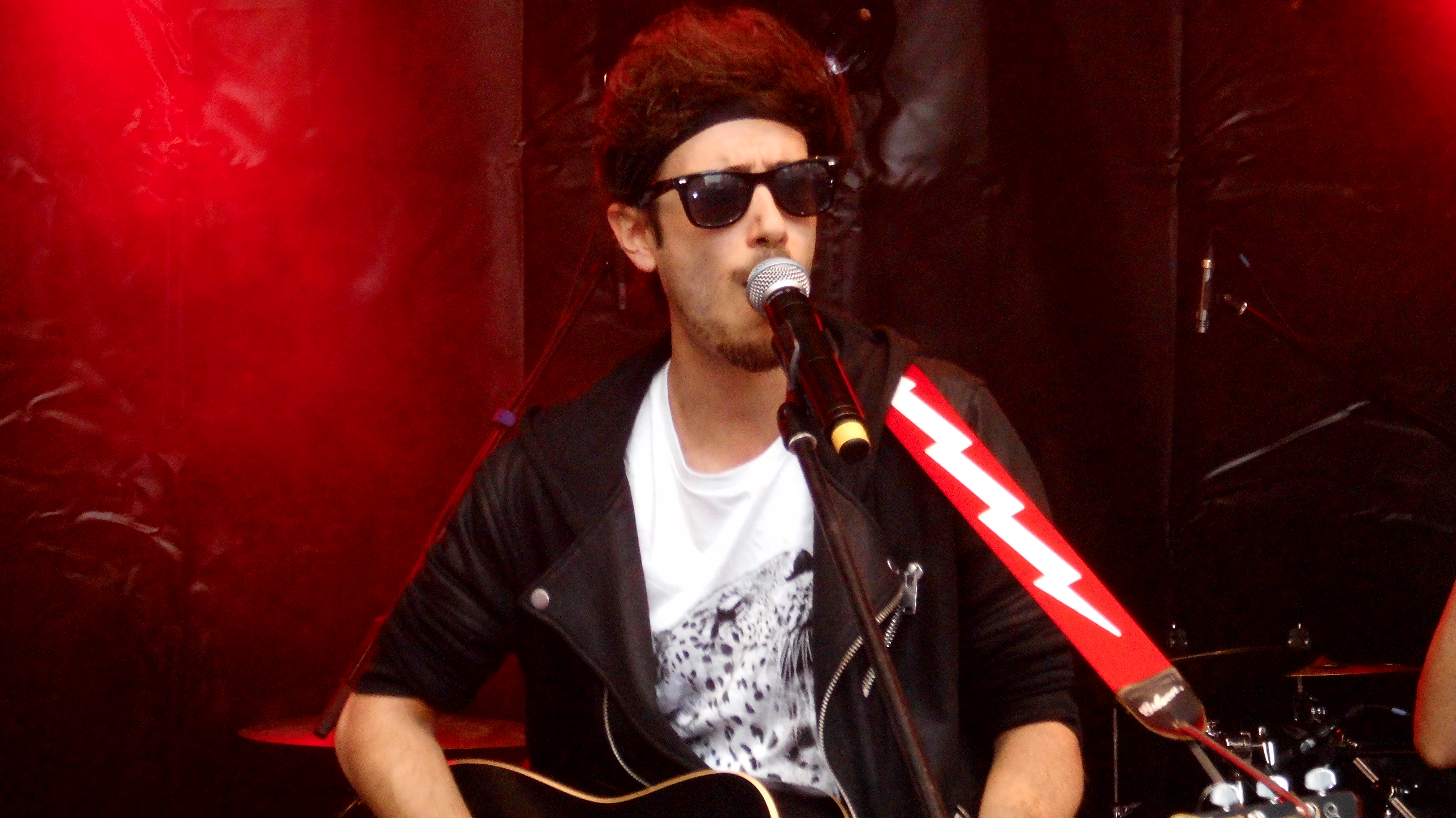 Christian Durstewitz auf dem Stadtfest Kassel am 22. Mai 2015. Christian Durstewitz ist ein deutscher Sänger und Songschreiber, der 2010 bei der Castingshow Unser Star für Oslo von Stefan Raab teilnahm.